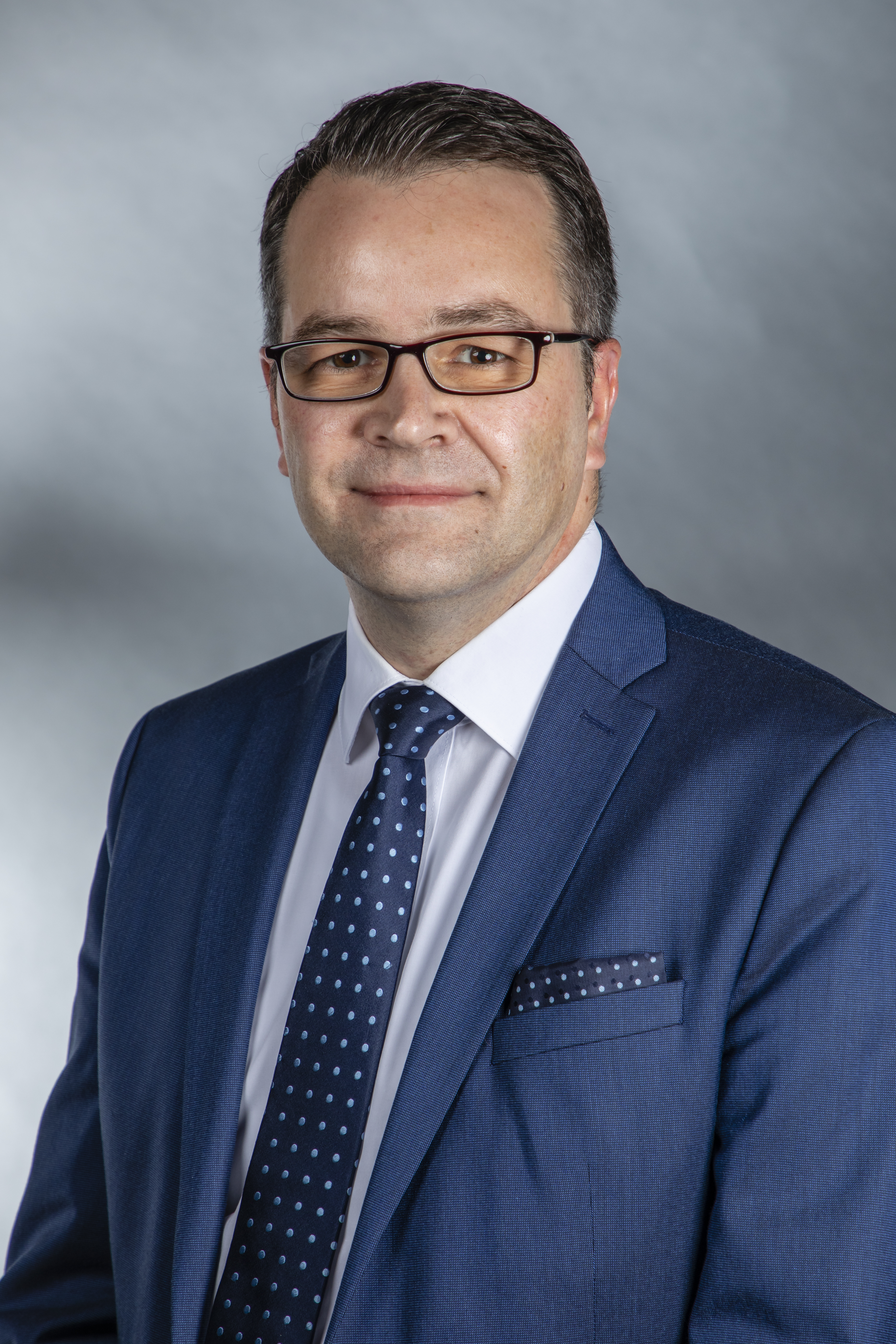 Tim Cordßen